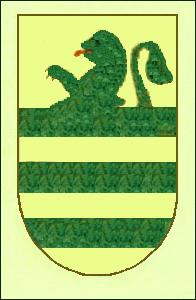 Blason de la famille Ordelaffi - copie d'une une gravre du XVIIème siècle, tirée du livre de Giacomo Fontana "Insegne di varii prencipi et case illustri d'Italia e altre provincie"